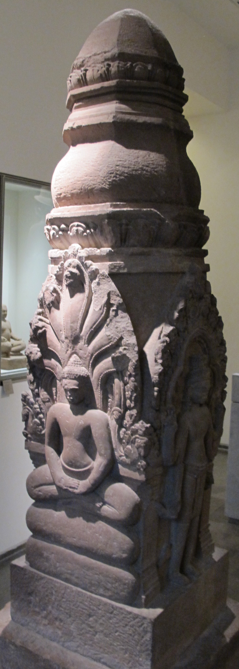 Cambogia, monumento buddista da kbal sre yeay yin, stile dei khleang, 975-1010 ca.